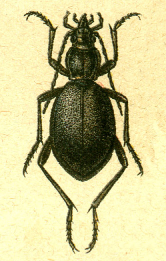 Cychrus caraboides